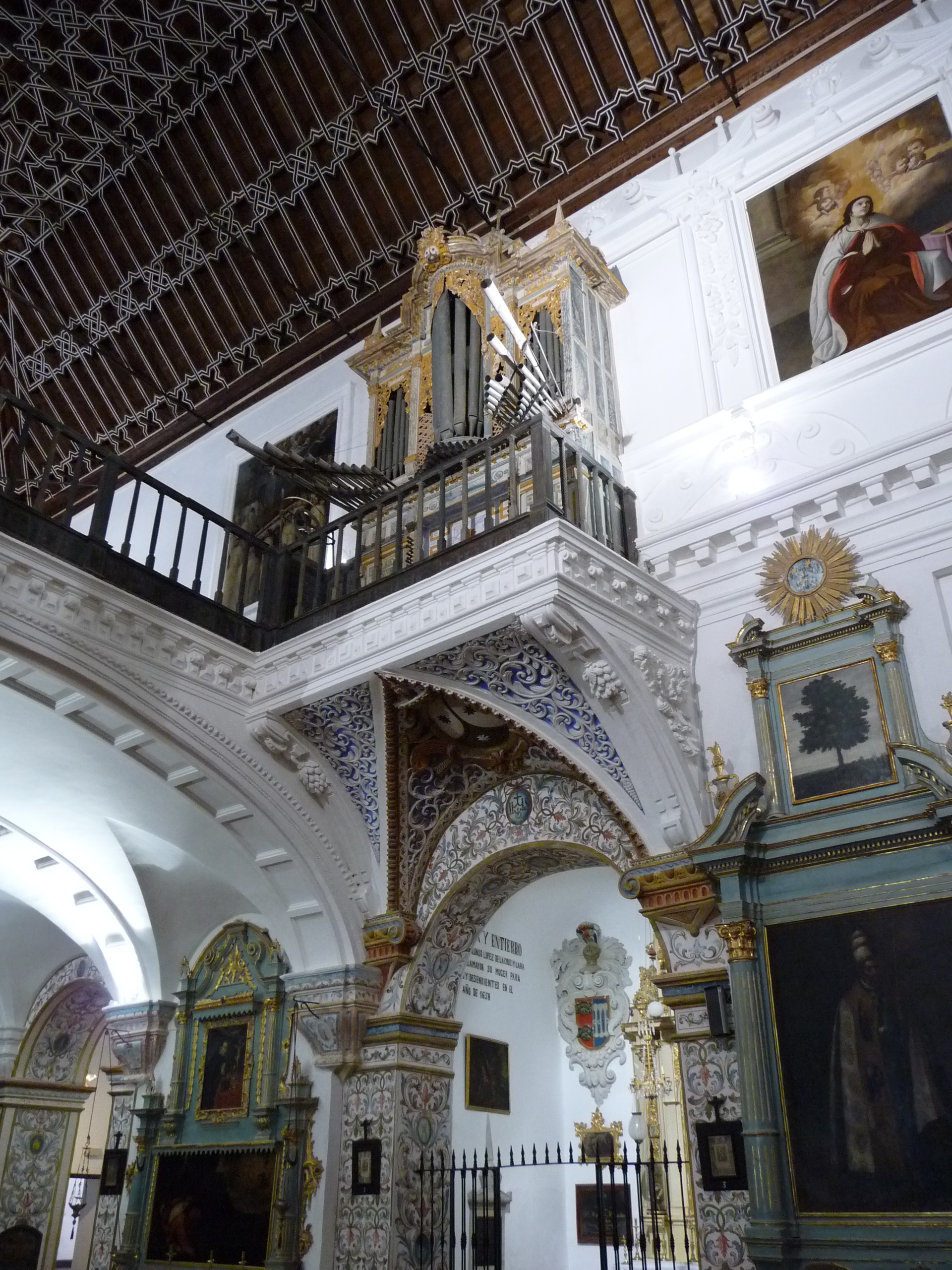 Iglesia del Carmen, Antequera-p1010847.jpg